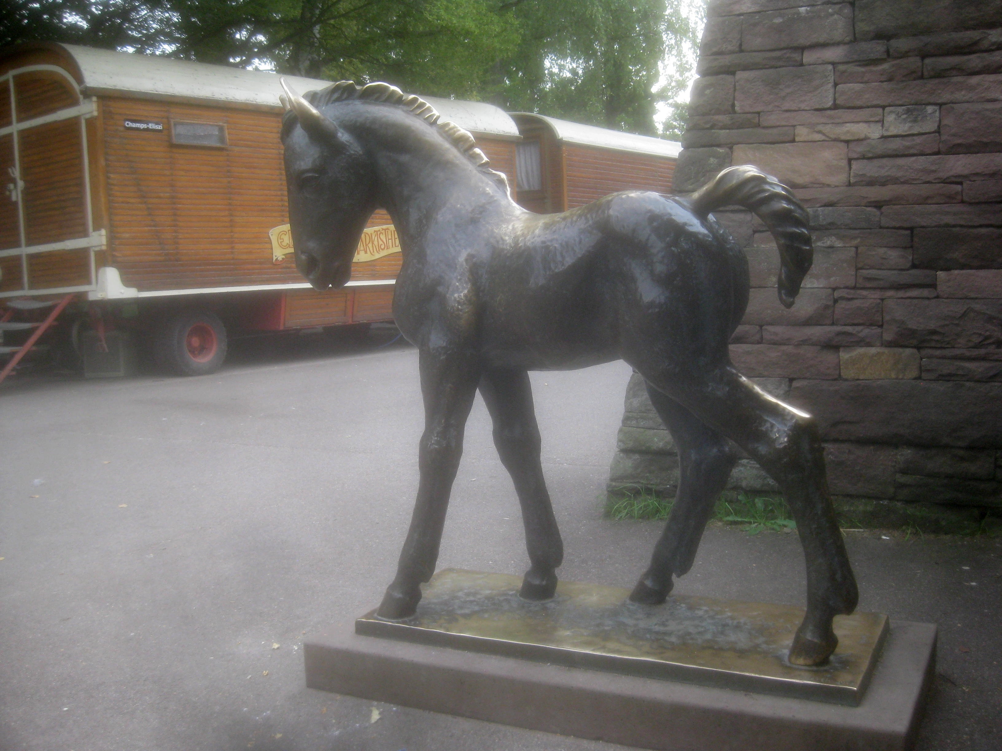 Hirschkuh mit Kitz von Josef Zeitler, 1939, ursprünglich Sandstein, heute Nachbildung in Bronze, Stuttgart, Höhenpark Killesberg.